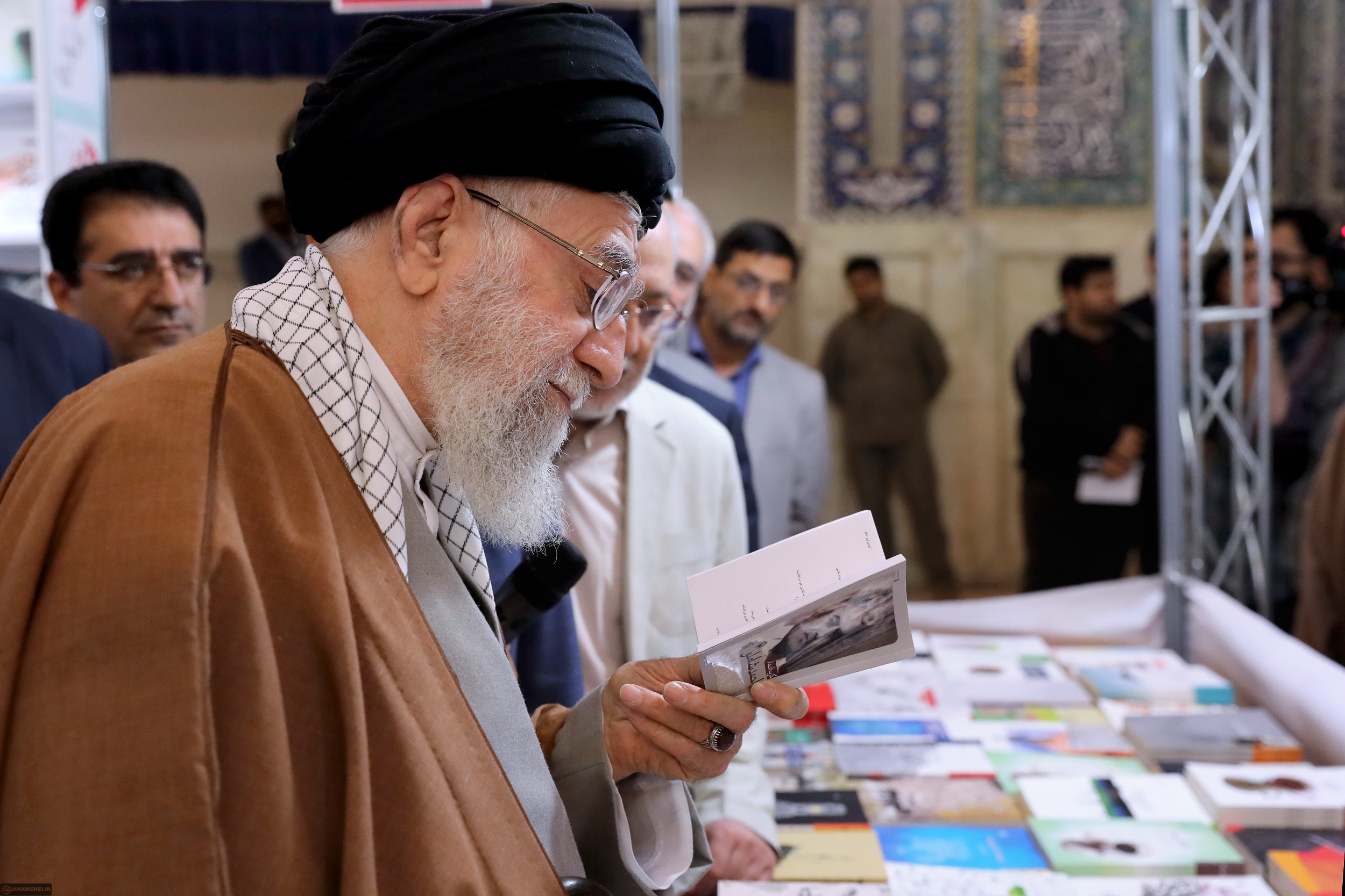 علی خامنه‌ای در حال مطالعهٔ کتاب گزینهٔ اشعار احمد شاملو در جریان بازدید از سی و دومین نمایشگاه بین‌المللی کتاب تهران